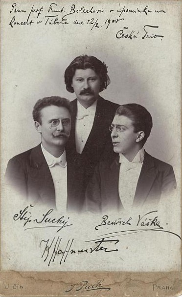 České trio ve složení Suchý, Váška, Hoffmaister (1900)